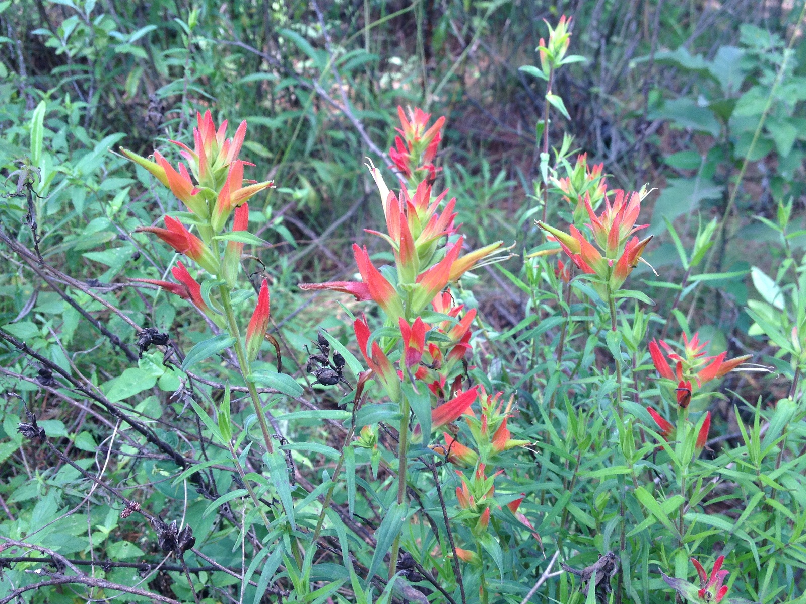 Cola de borrego (Castilleja tenuiflora) en el Malpaís de Nealtican